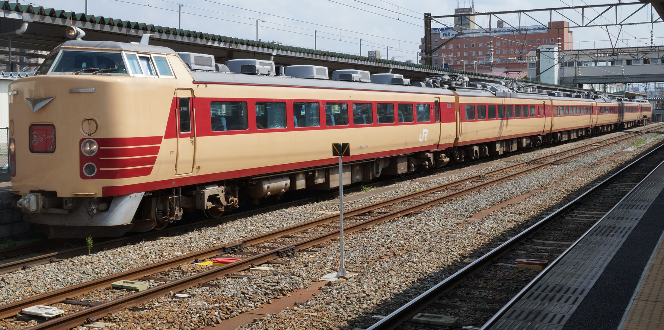 会津若松駅停車中の485系A1A2編成